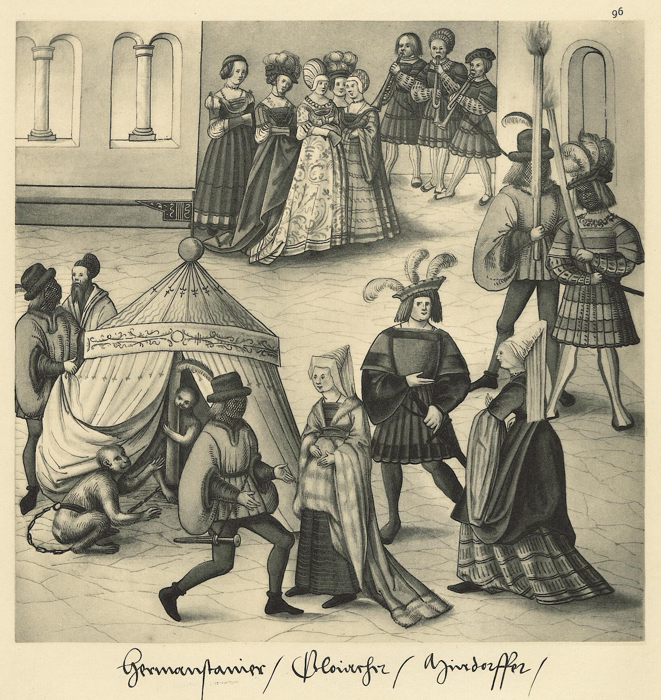 Tafel aus: Freydal: des Kaisers Maximilian I. Turniere und Mummereien; mit einer geschichtl. Einleitung. Tafeln. Wien, 1882. Exemplar der UB Tübingen. (Faksimileedition des Turnierbuchs Freydal, Kunsthistorisches Museum Wien, Signatur: K.K. 5073) Tafel 96 Hermansteiner, Gloiacher, Mindorffer